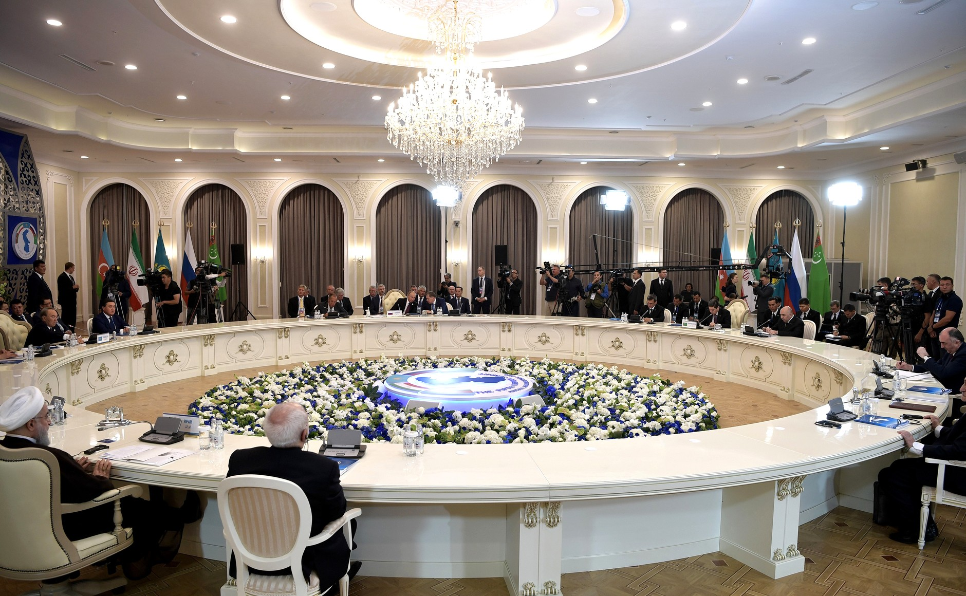 Пятый каспийский саммит